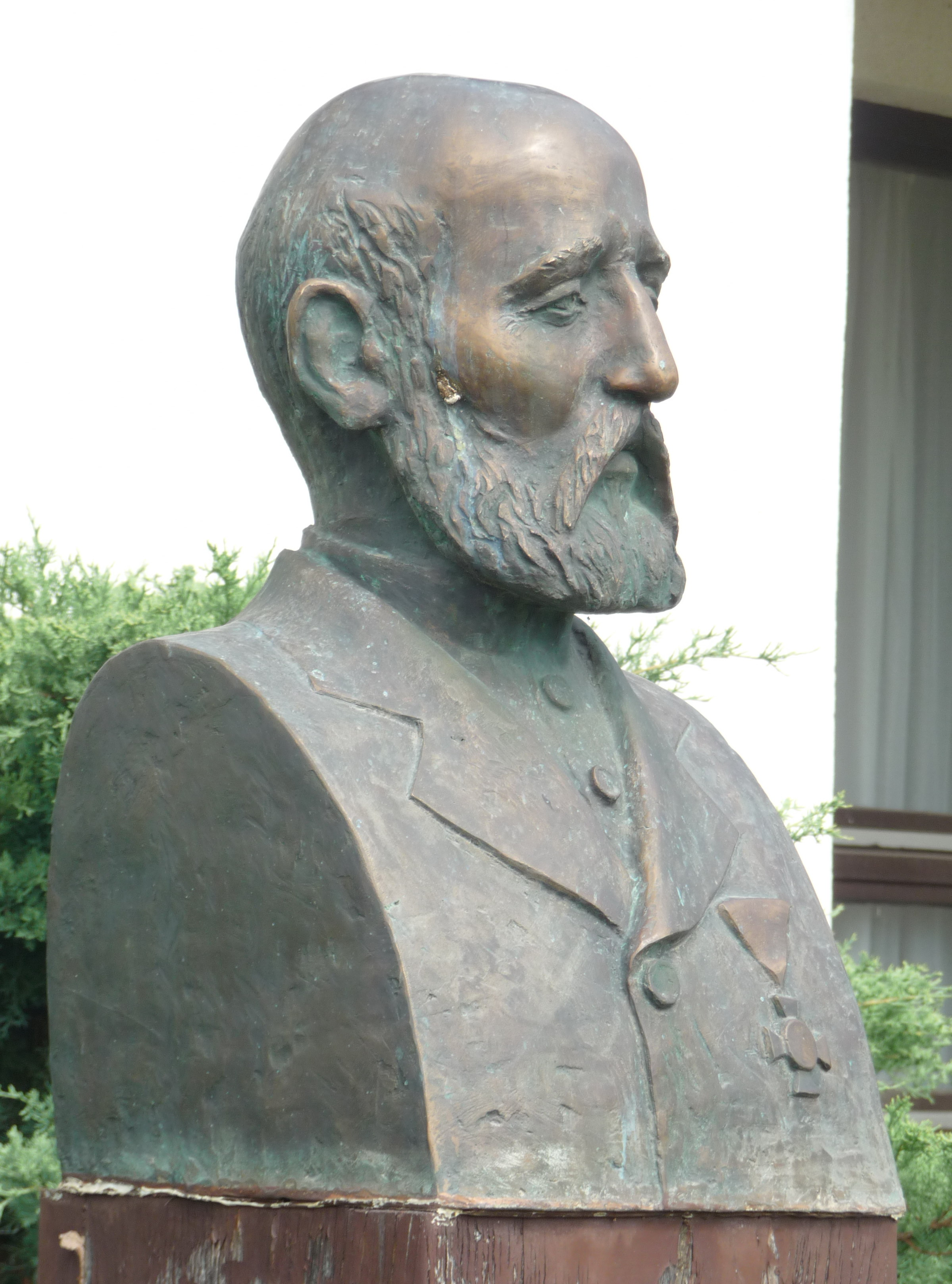 Szabolcs Péter (1996): Gózon Imre mellszobra, Szentgyörgyvölgy